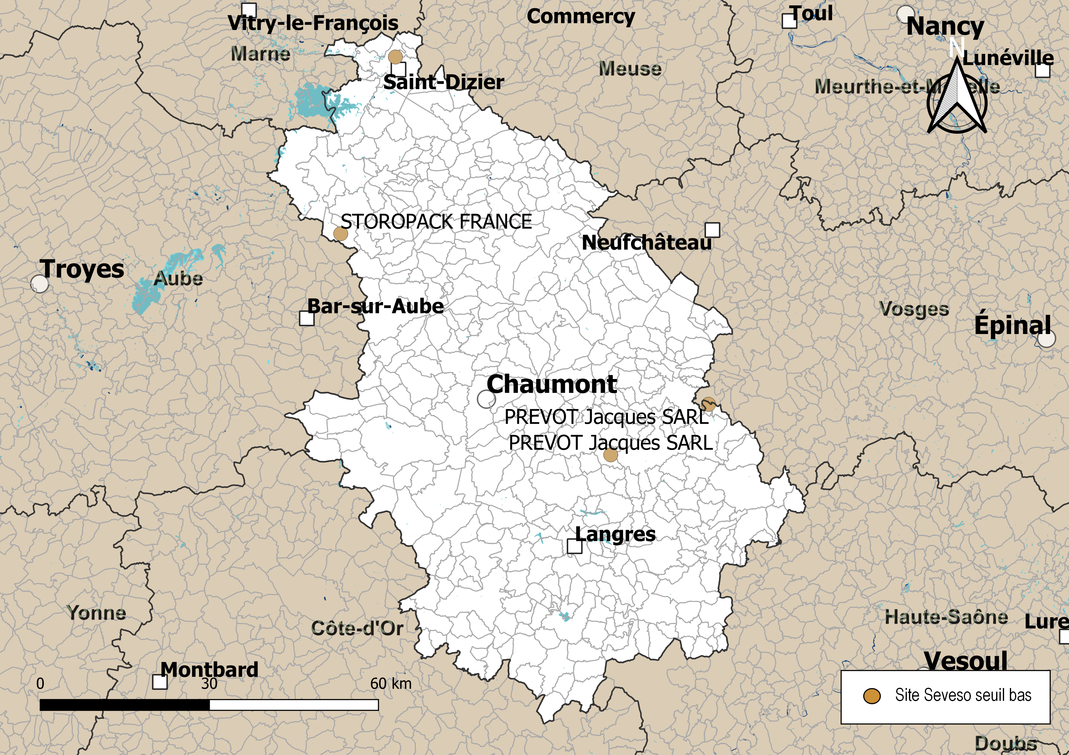 Carte de localisation des sites Seveso seuil bas dans le département de la Haute-Marne (Grand Est, France). Carte arrêtée au 4 novembre 2019.